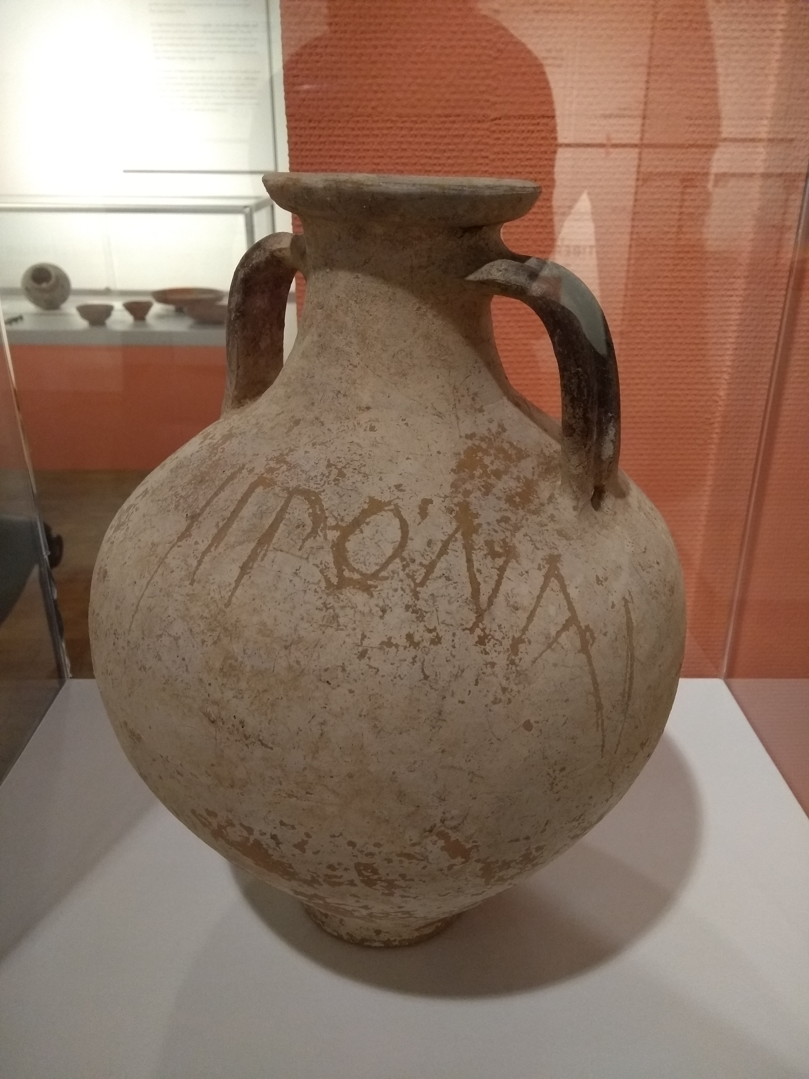 Antikes zweihenkliges Keramikgefäß, gefunden im heutigen Ludwigshafen-Rheingönheim, mit eingeritzter Inschrift "EPONAI" (= vulgärlateinischer Genitiv des Namens der keltischen Göttin Epona; das E hat hier die Form zweier senkrechter Striche). Foto aus der Ausstellung „Die Römer in LU“ im Stadtmuseum Ludwigshafen, Sommer 2018.